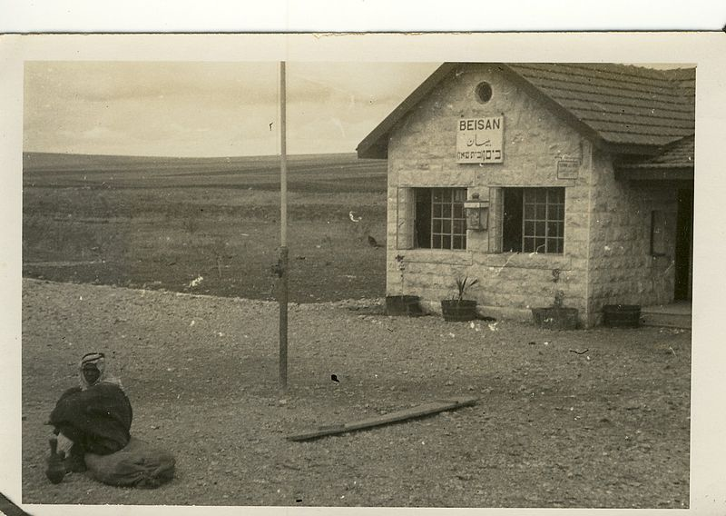 סיור במסילת רכבת העמק 2012